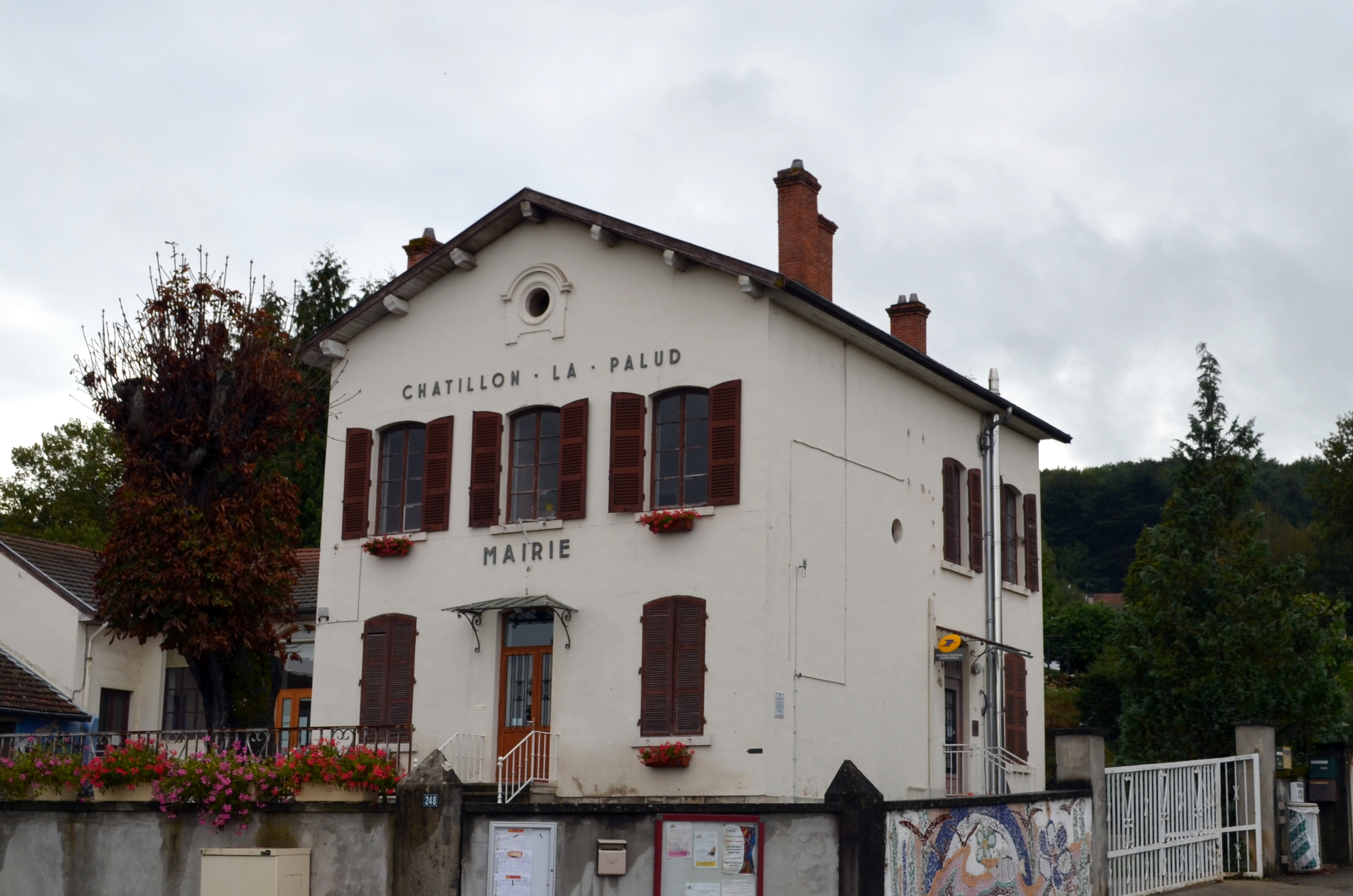 Mairie de Châtillon-la-Palud.